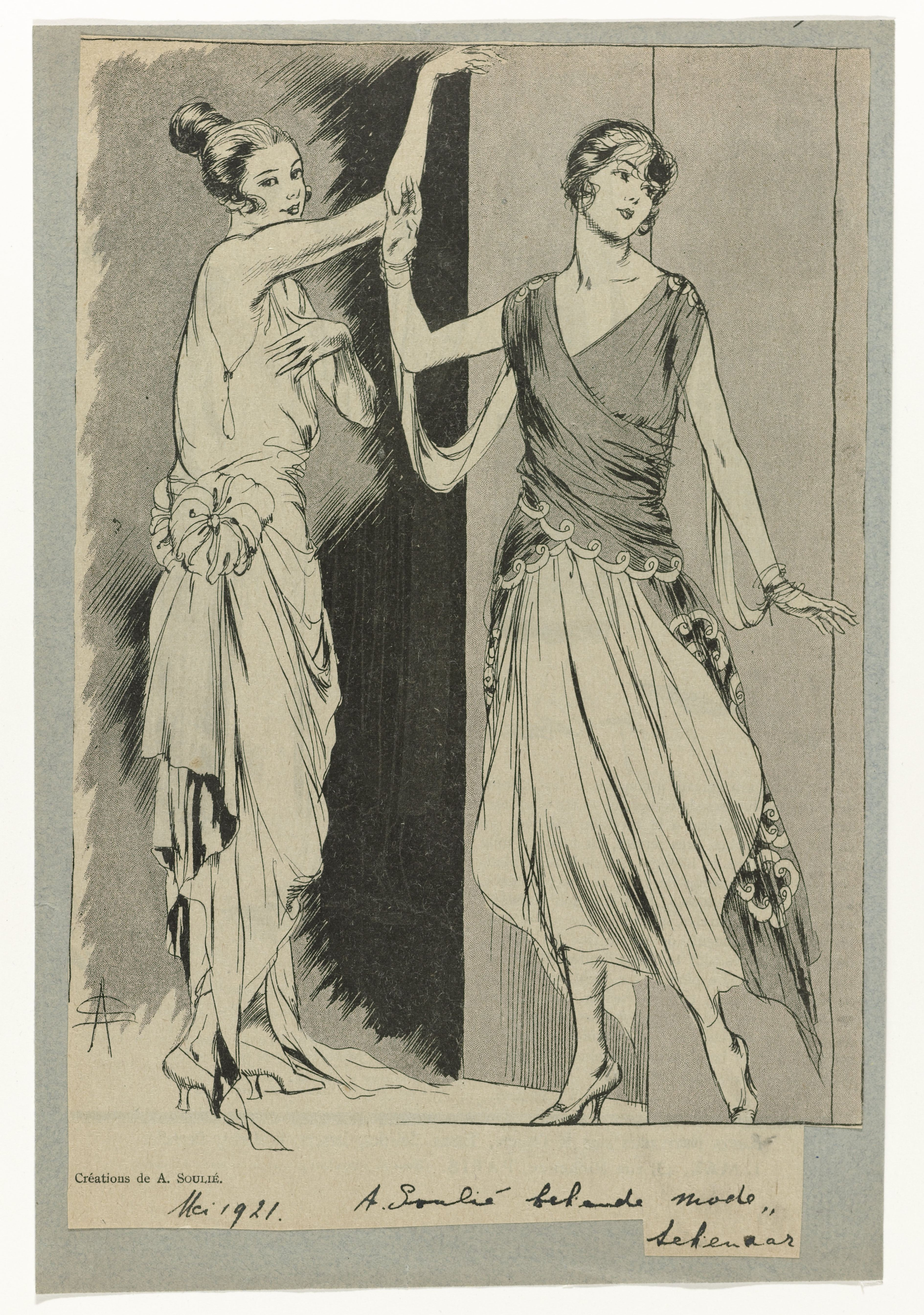 IdentificatieTitel(s): Créations de A. Soulié, Mei 1921Objecttype: modeprent Objectnummer: RP-P-2009-3865Opschriften / Merken: onderschrift, linksonder, gedrukt: ‘Créations de A. Soulié’opschrift, midden onder, geschreven: ‘Mei 1921. A . Soulié bekende mode , tekenaar’VervaardigingVervaardiger: prentmaker: anoniemnaar tekening van: A. Soulié (vermeld op object)Datering: 1921Materiaal: papier Afmetingen: blad: h 308 mm × b 202 mmgeheel: h 321 mm × b 216 mmOnderwerpWat: fashion platesdress, gown (+ women's clothes)Wanneer: 1921 - 1921Verwerving en rechtenCredit line: Bruikleen van de Collectie M.A. Ghering-van IerlantVerwerving: bruikleen 4-dec-2014Copyright: Publiek domein